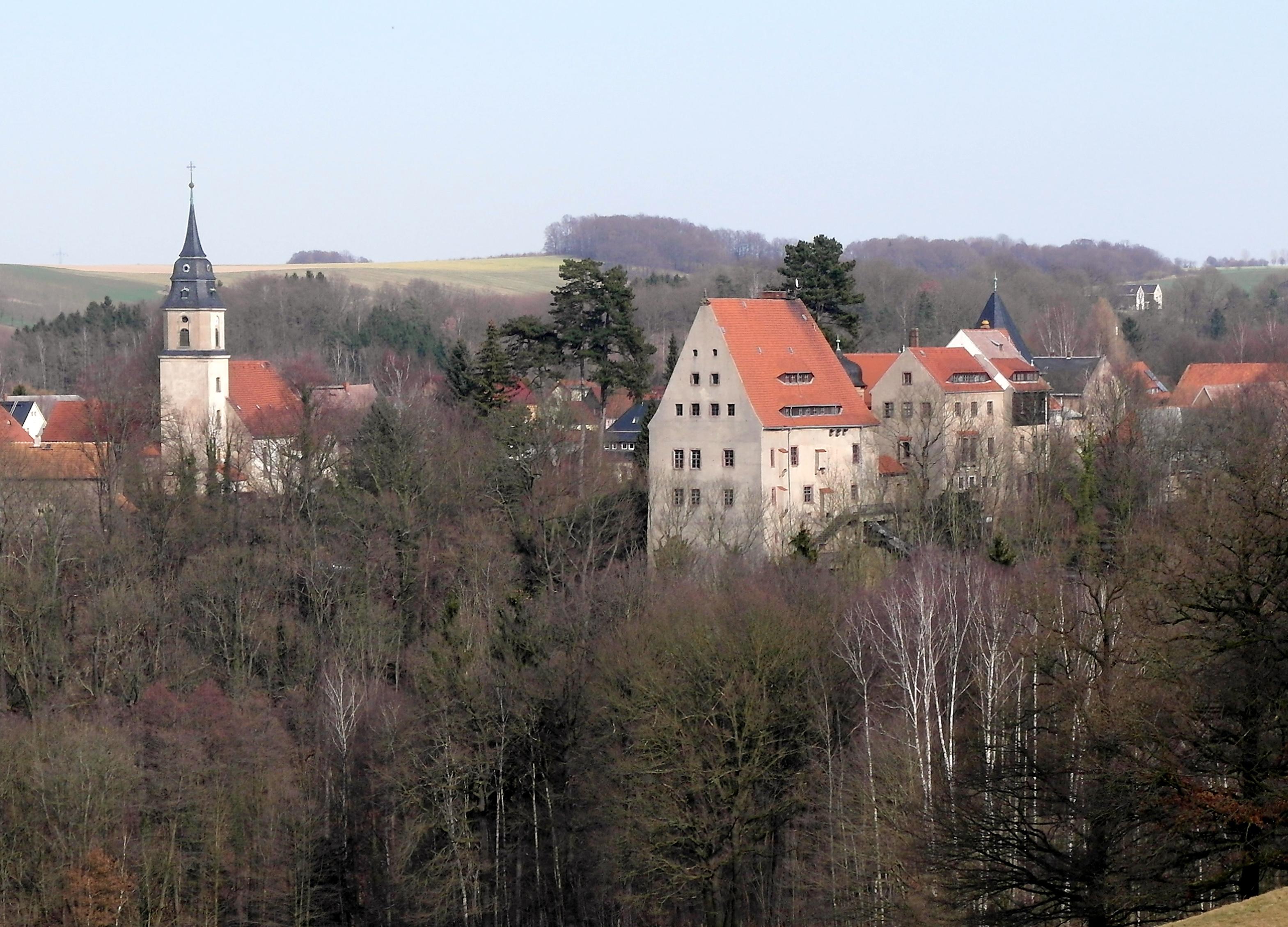 17.03.2015 09629 Reinsberg: Kirche und Schloß, Fernsicht von Westen. [SAM8997.JPG]20150317340DR.JPG(c)Blobelt